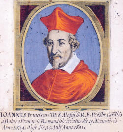 Giovanni Guidi di Bagno.